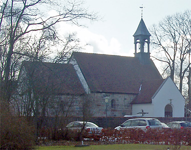 Randlev Kirke, Odder Kommune, Hads Herred, Århus Amt, Denmark